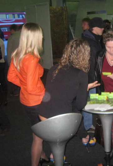 Девушки-промоутеры раздают брошюры. Для иллюстрации статьи "Промоутер" Обрезал и заретушировал логотипы и лица.